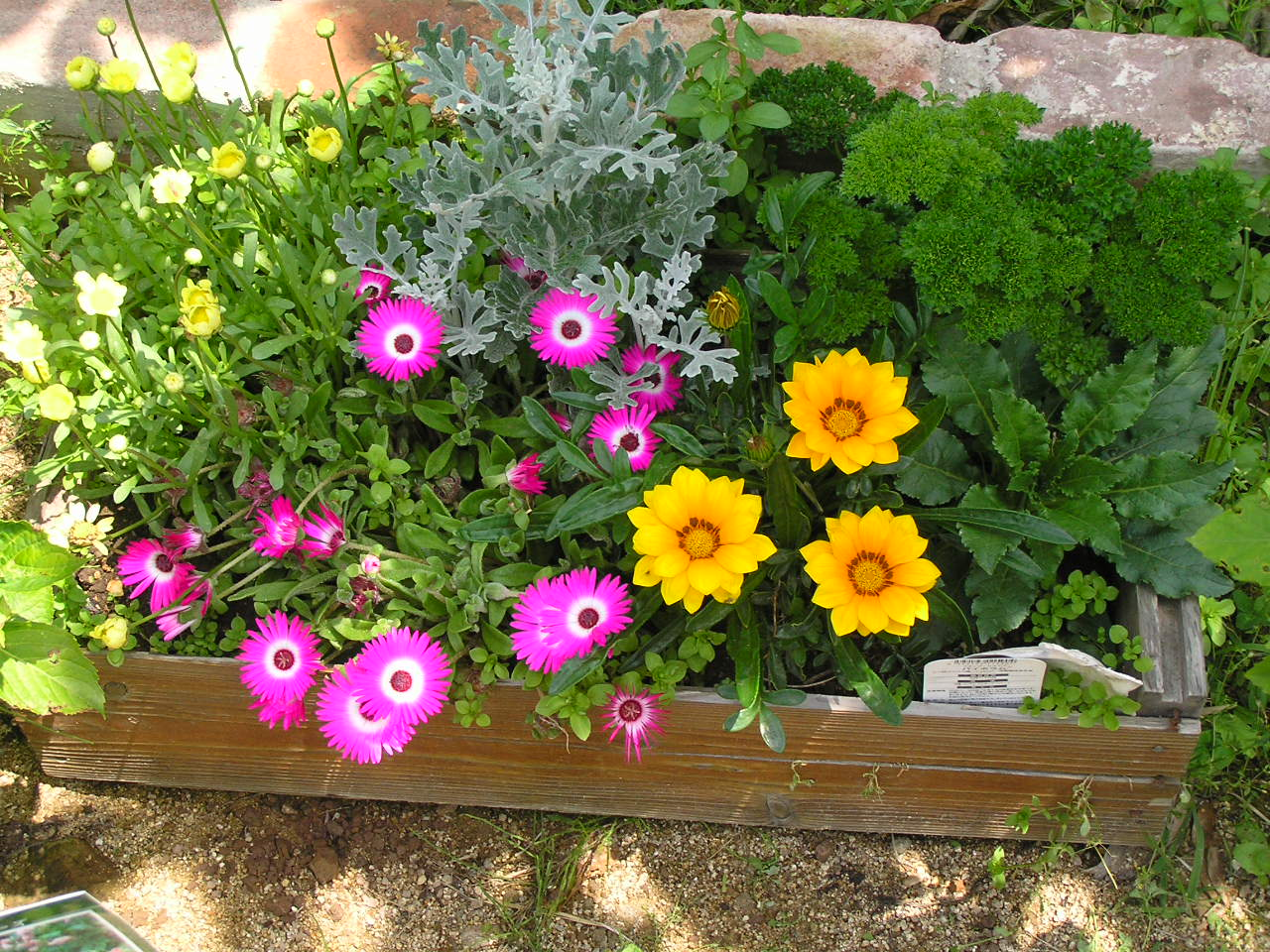 Yoseue-寄せ植え